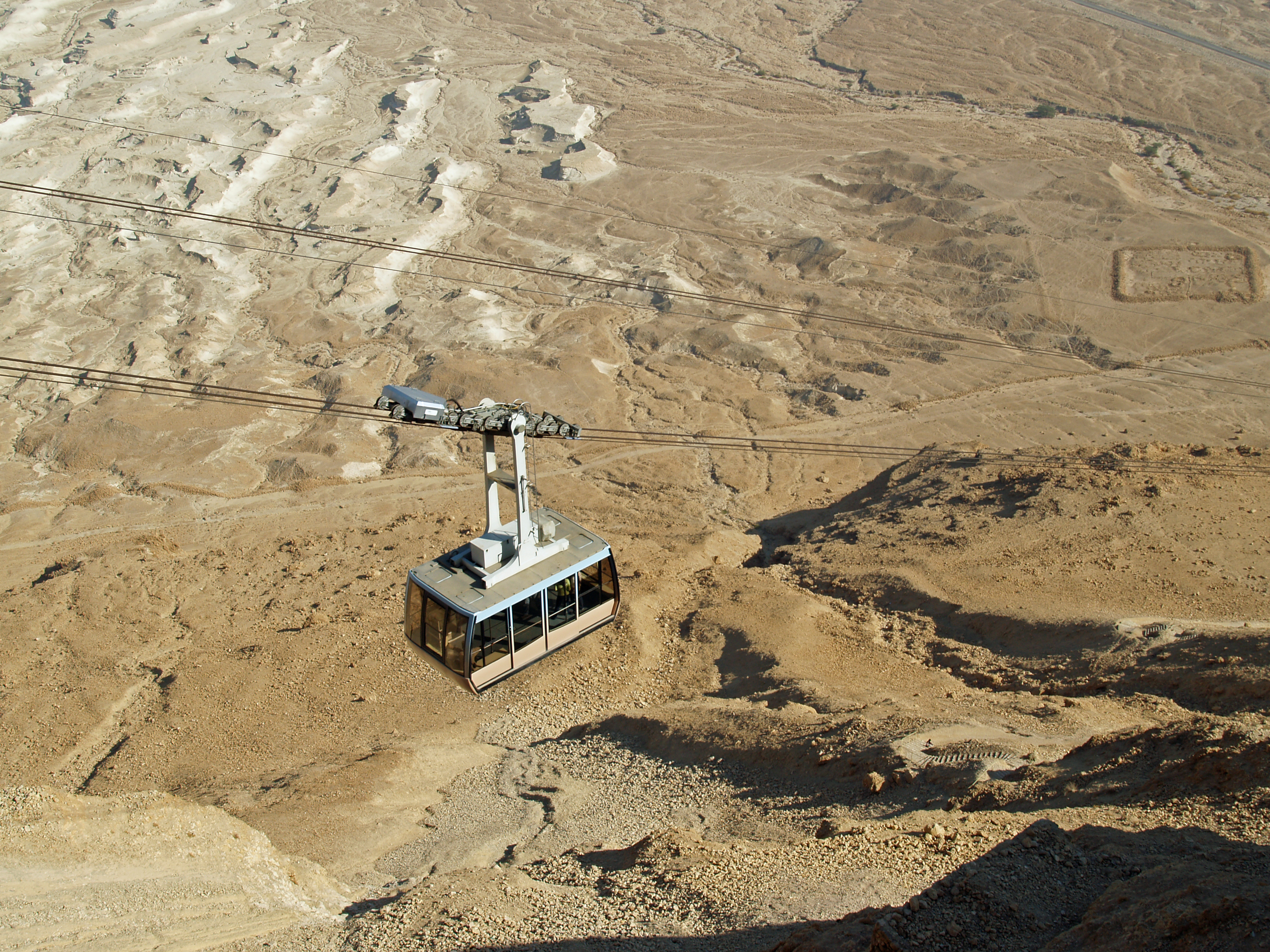 Masada Tram Car